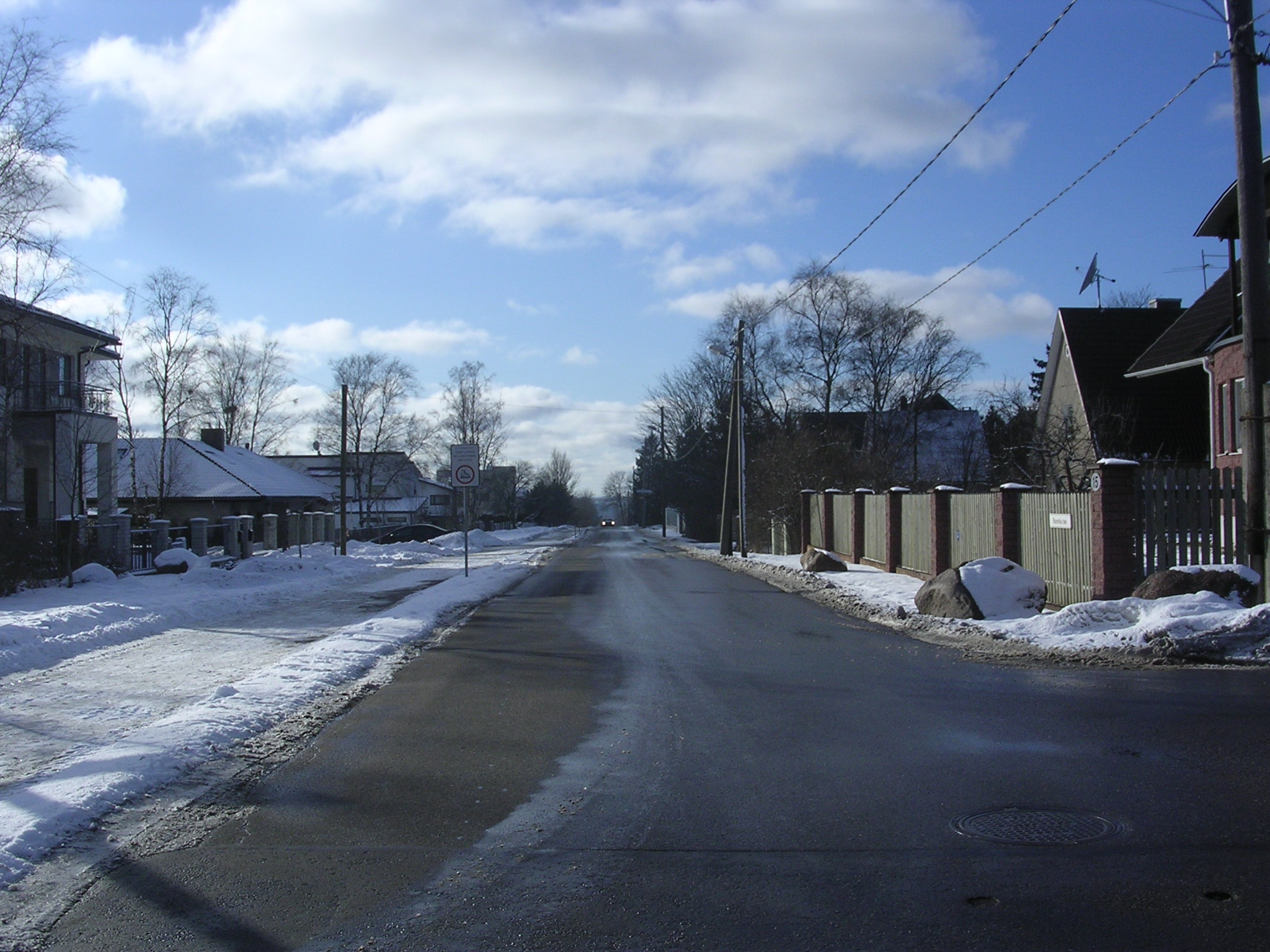 Merivälja